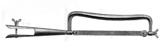 Flügelsäge